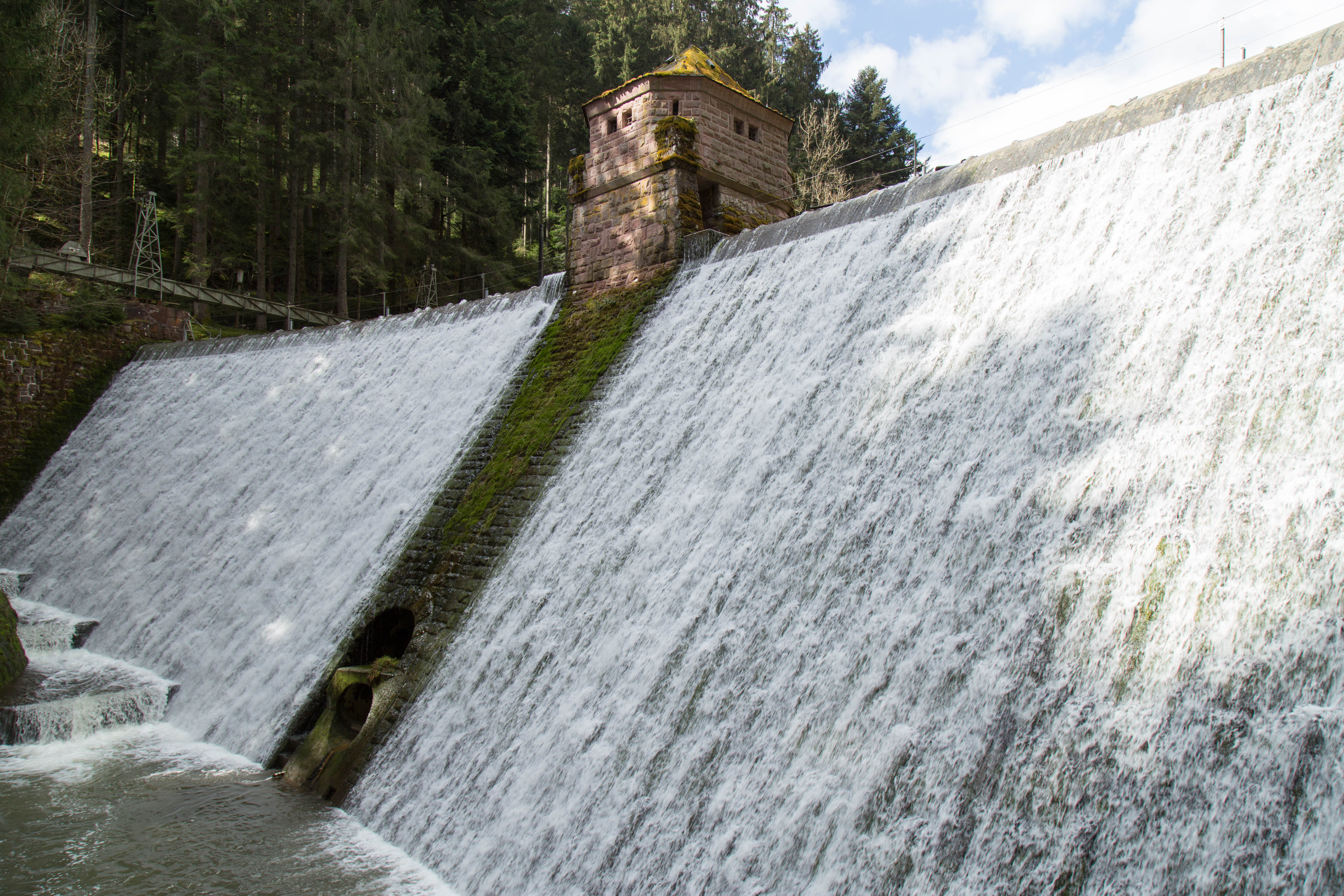 Staumauer der Heimbach-Talsperre bei Sterneck (Loßburg)